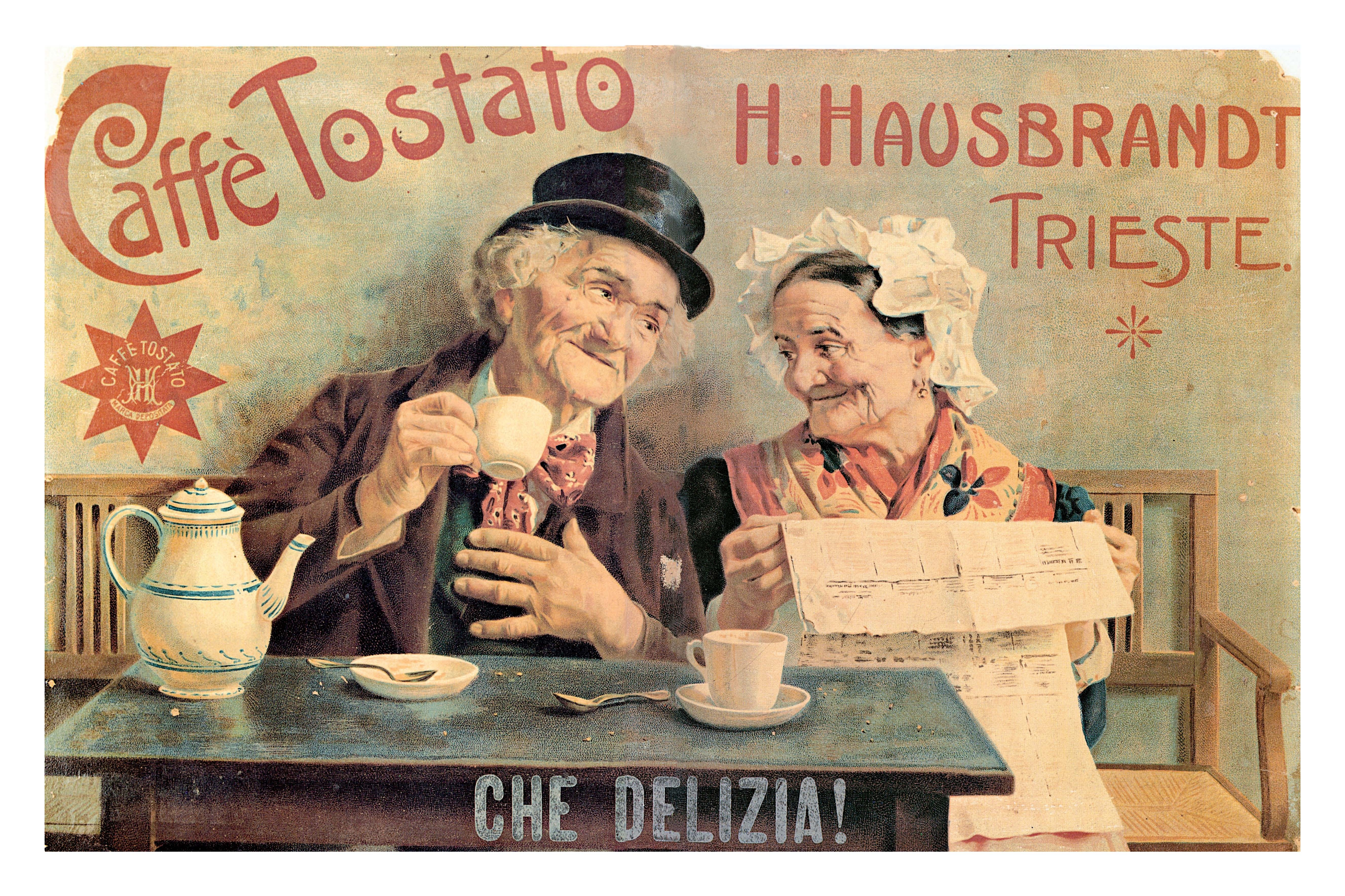 "I Vecchietti", prima campagna storica Hausbrandt